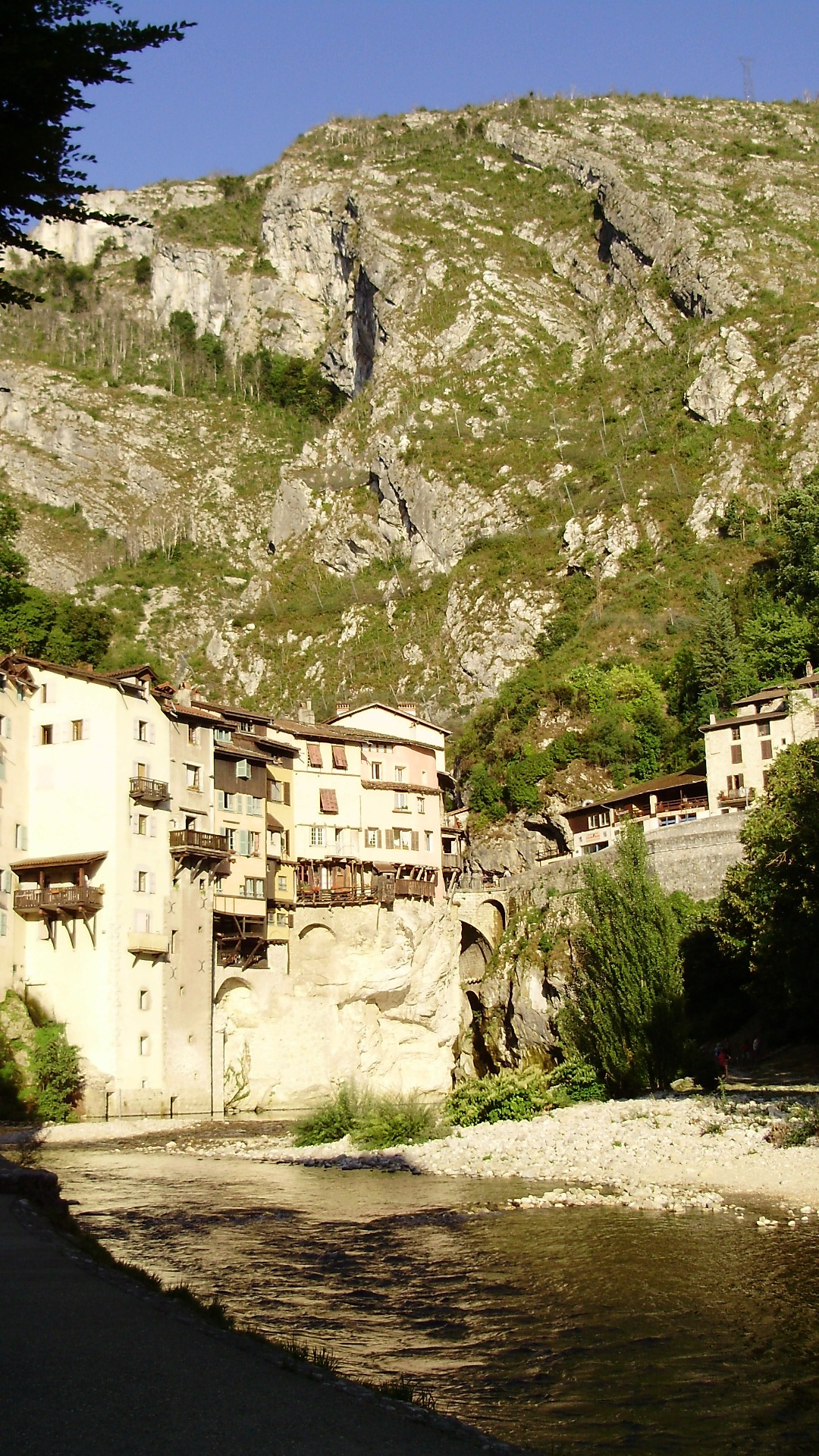 Les maisons de Pont-en-Royan, dominant la Bourne.